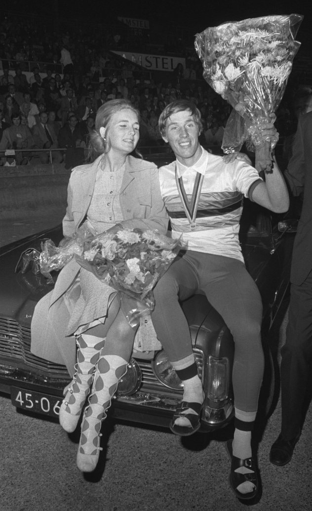 Huldiging wereldkampioenschappen sprint Leijn Loevesijn Olympisch Stadion Amsterdam